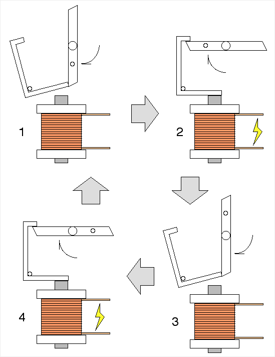 Diagram of motion of a radio control model escapement